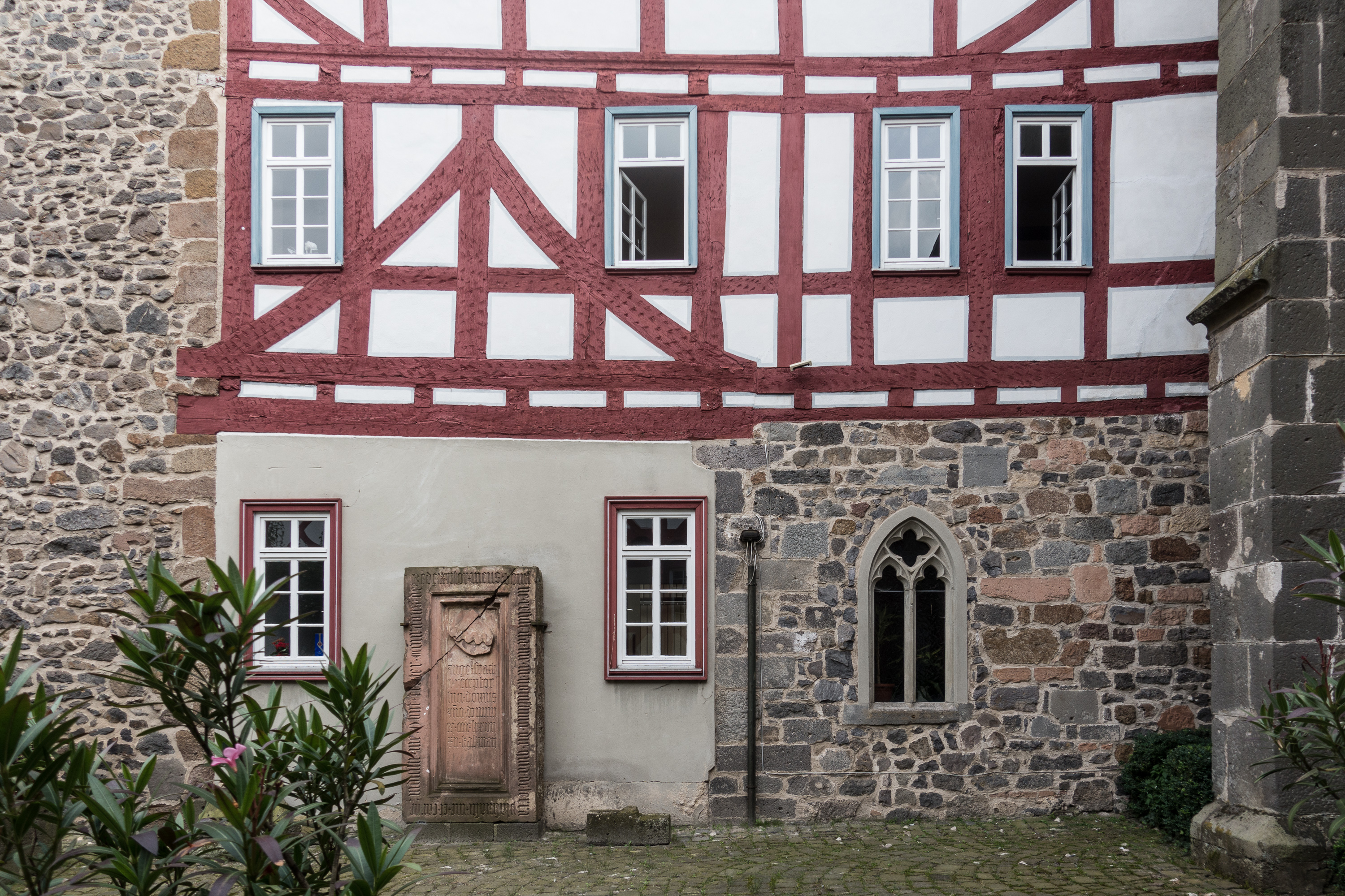 Ehem. Sakristei und Schlossflügel vom Innenhof aus gesehen. Das Antoniterkloster in Grünberg wurde um 1200 gegründet und bestand bis zur Einführung der Reformation in der Landgrafschaft Hessen im Jahre 1526. Ab 1577 wurde die Anlage zu einem landgräflichen Schloss (Wittwensitz) umgebaut.